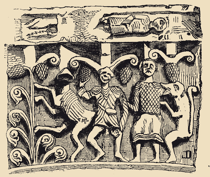 Saint Martin de Sescas Chapiteau arc triomphal nord